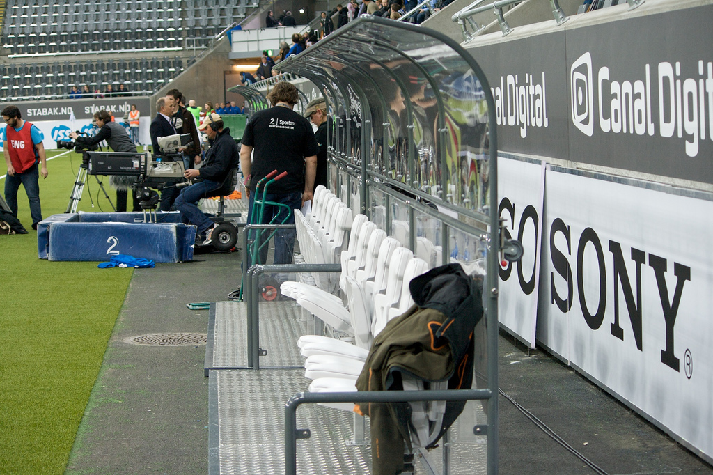 Innbytterbenken til bortelaget